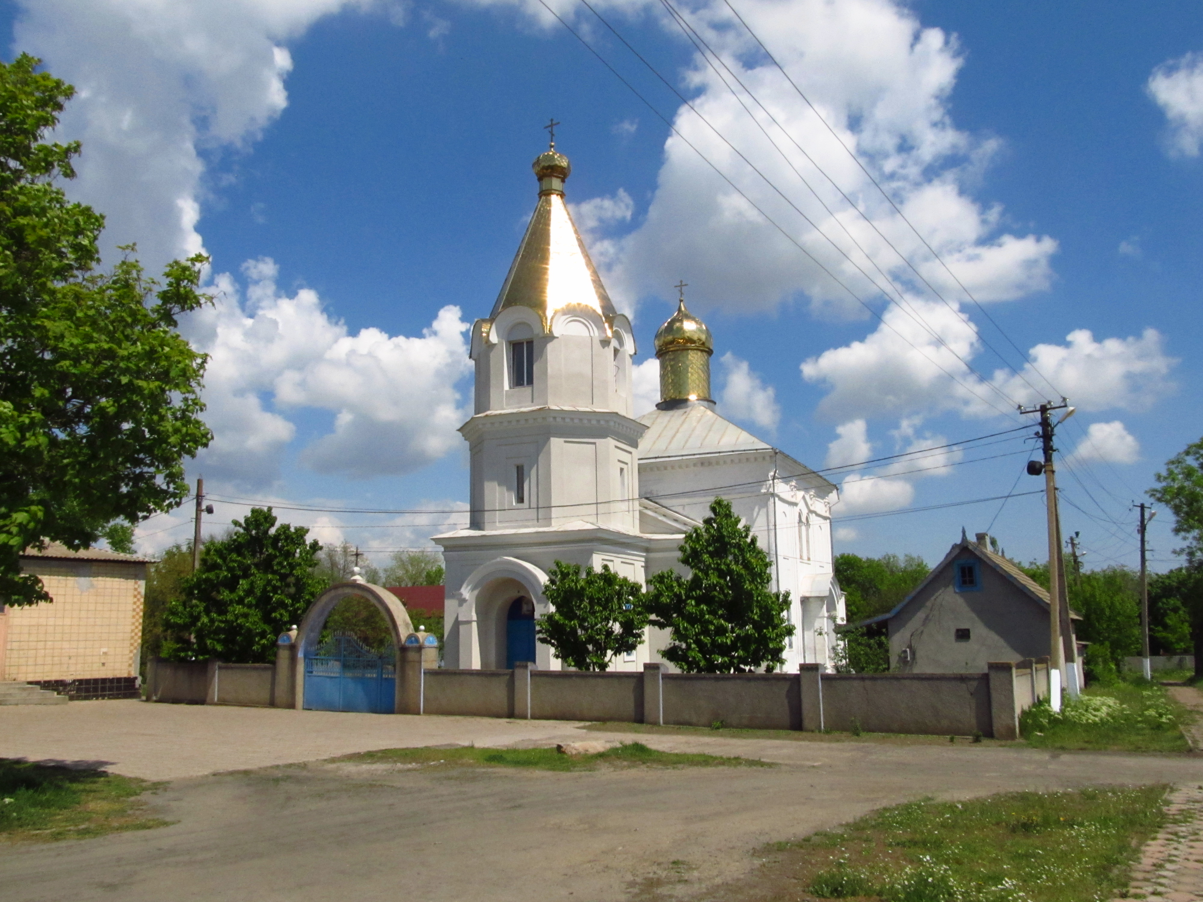 Церква Різдва Богородиці (Свято-Георгіївська), с. Виноградівка